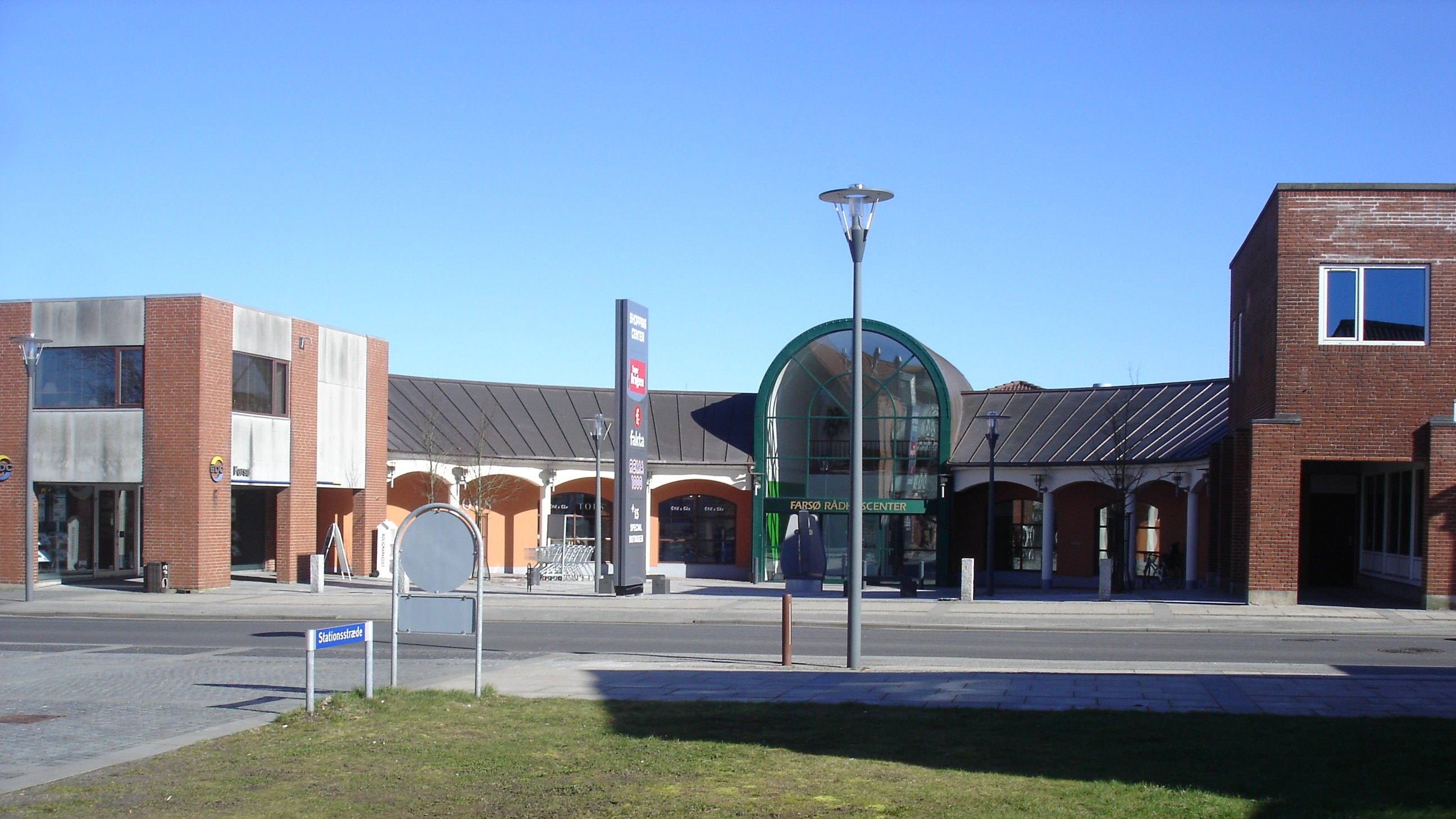 Rådhuscentret i Farsø, set fra Stationsstræde